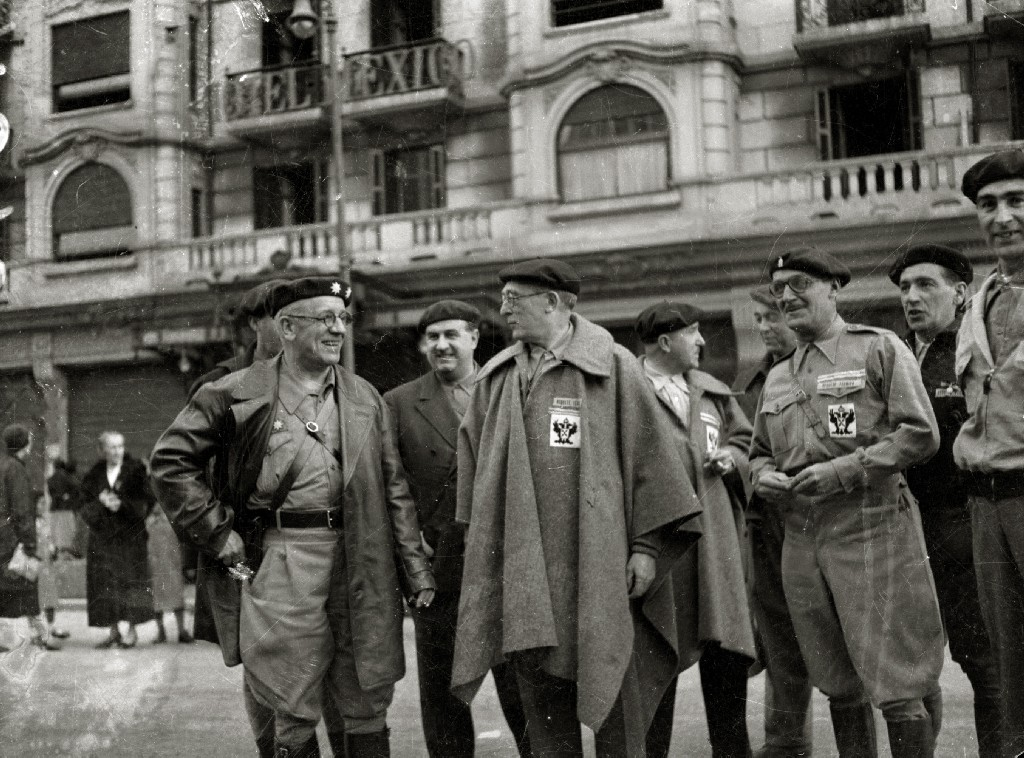 Título original: Preparativos y desfiles militares por la avenida de la Libertad (5/12) Localización: San Sebastián (Guipúzcoa)